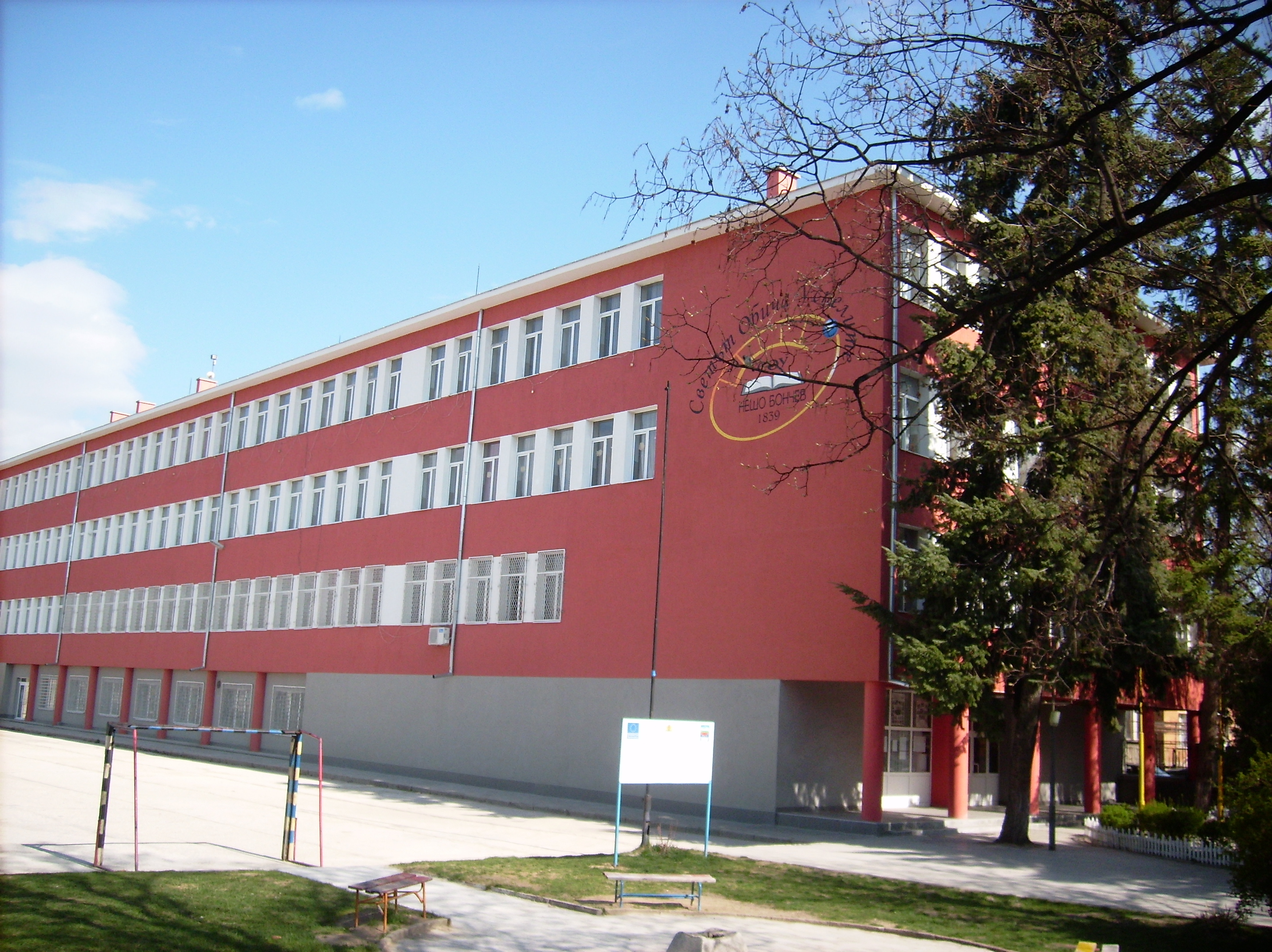 СОУ "Нешо Бончев" в град Панагюрище